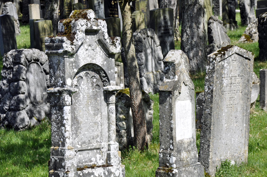 Historischer jüdischer Friedhof in Endingen, Aargau